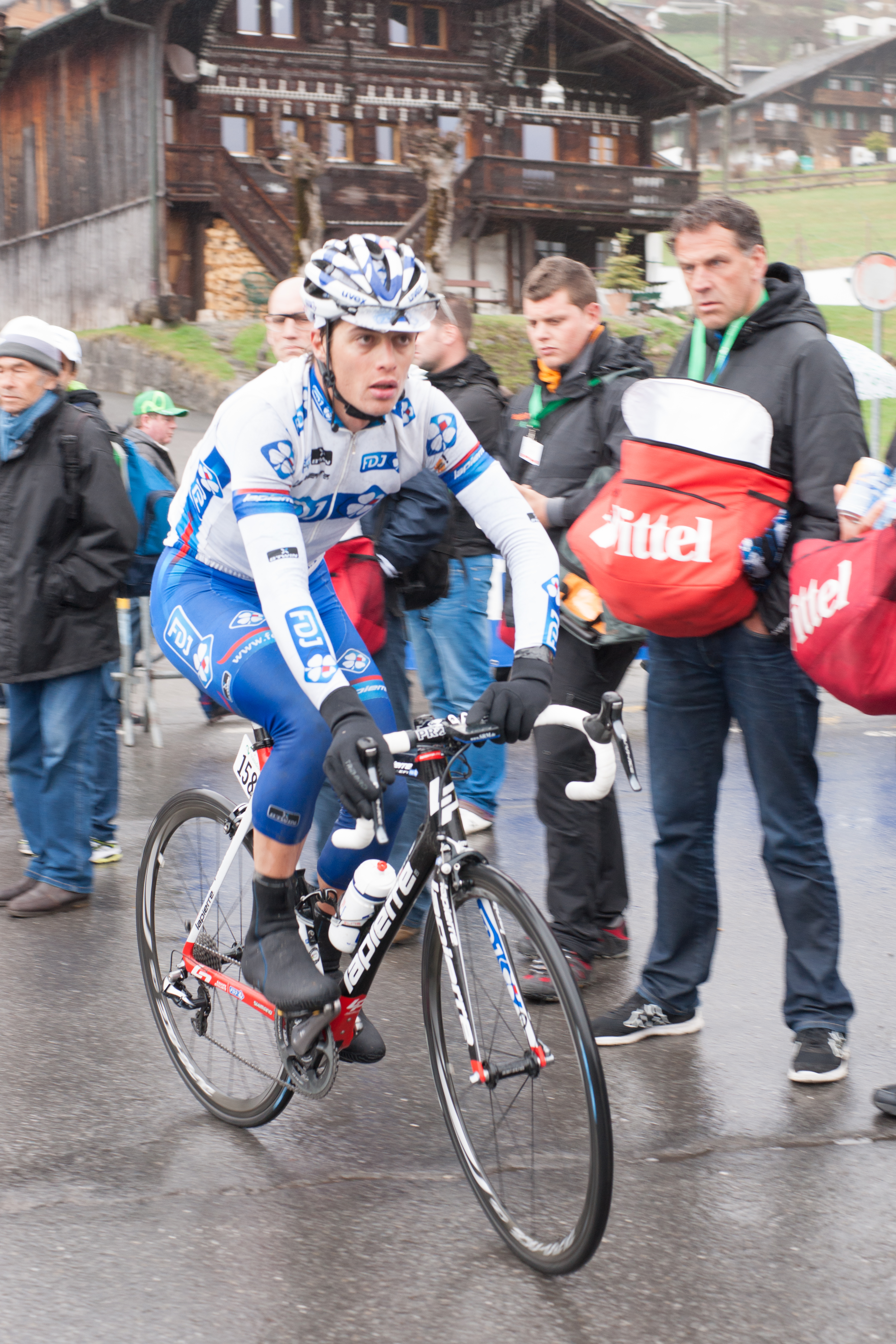 Tour de Romandie 2013, 4ème étape, Arthur Vichot